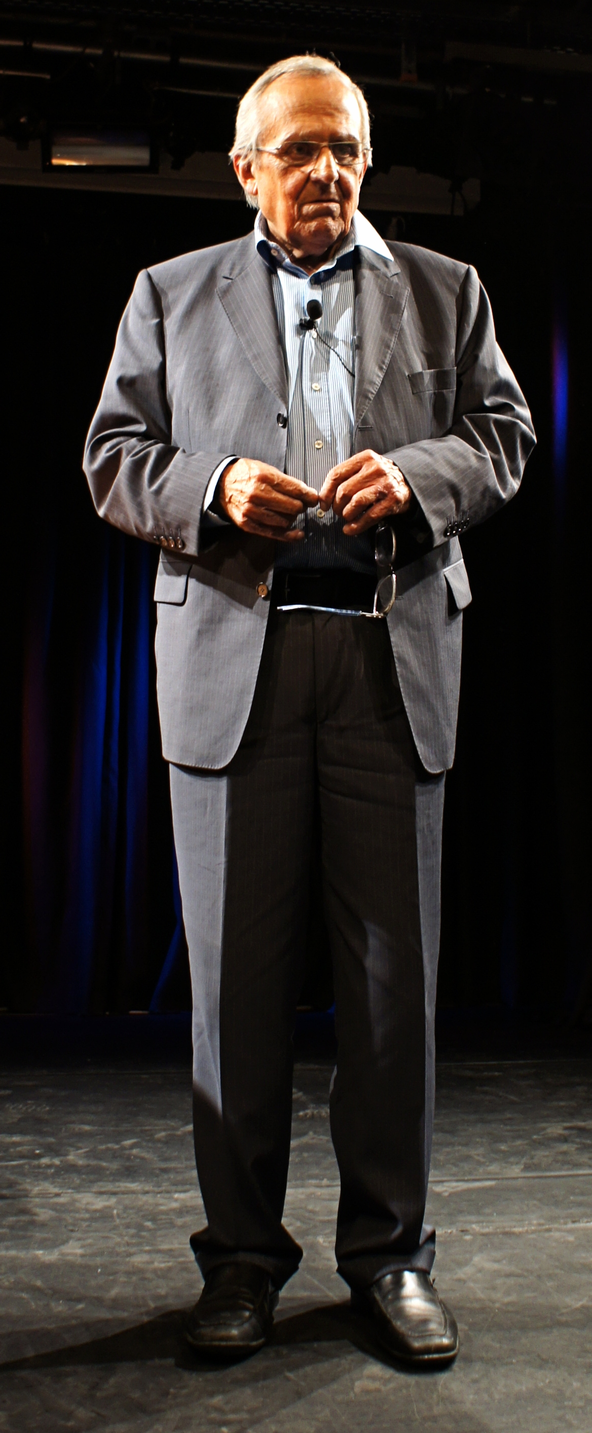 Der Kabarettist Dieter Hildebrand mit seinem Programm Ich kann doch auch nichts dafür im Herbst 2011